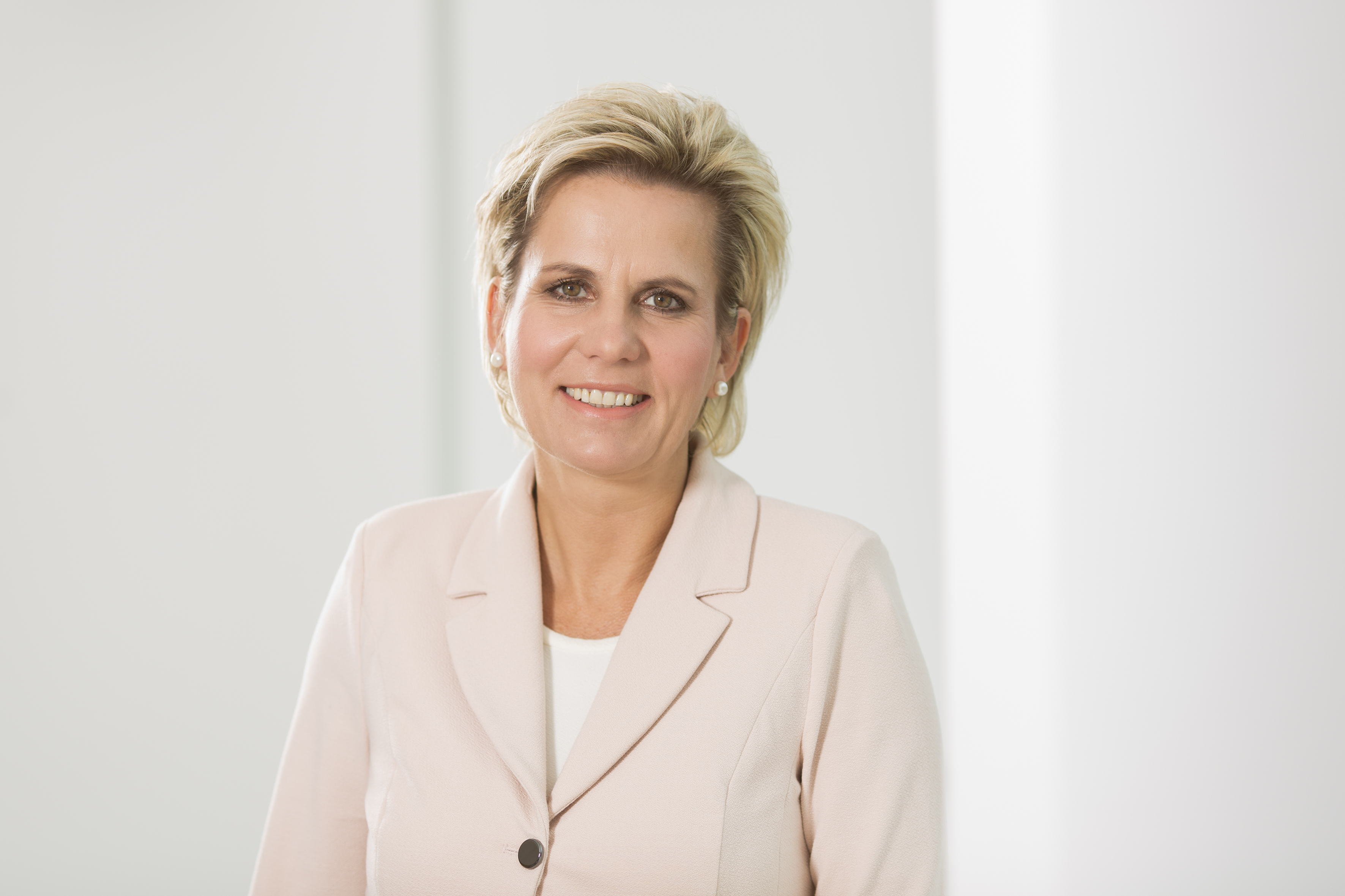 Offizielles Pressefoto von Barbara Klepsch, Sächsische Staatsministerin für Soziales und Verbraucherschutz (2015)